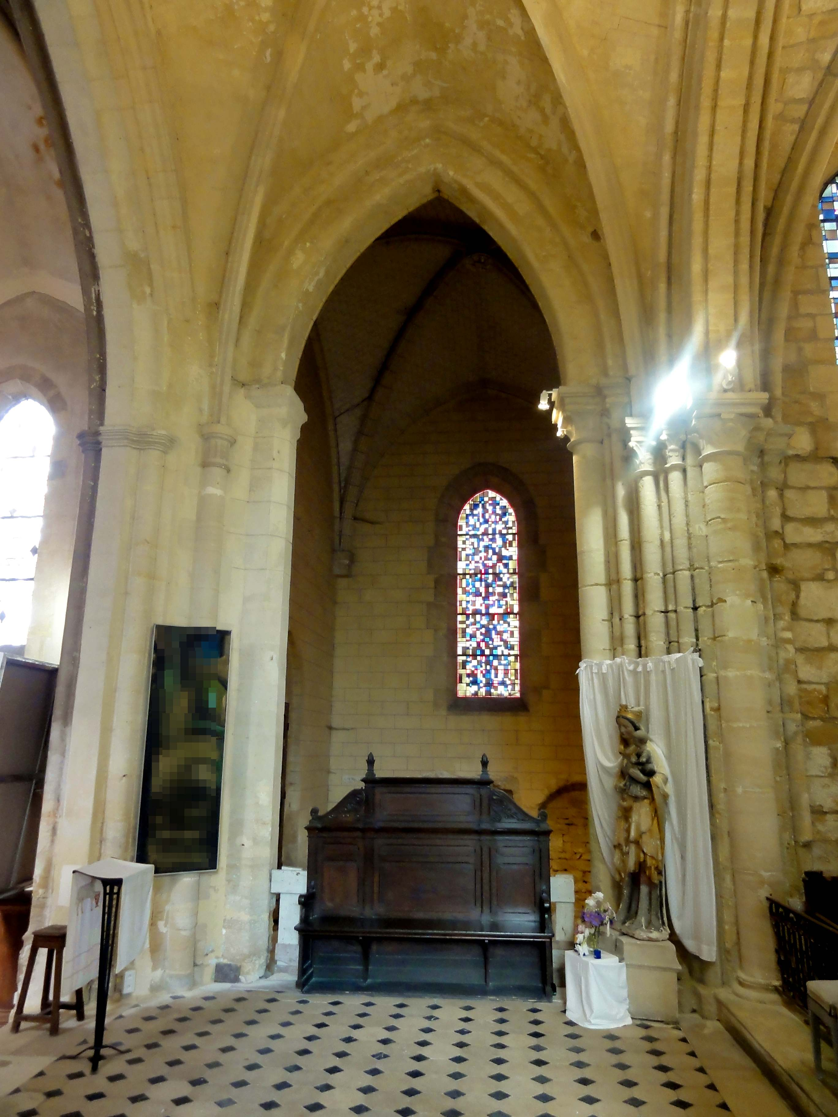 Intérieur de l'église - voir titre.